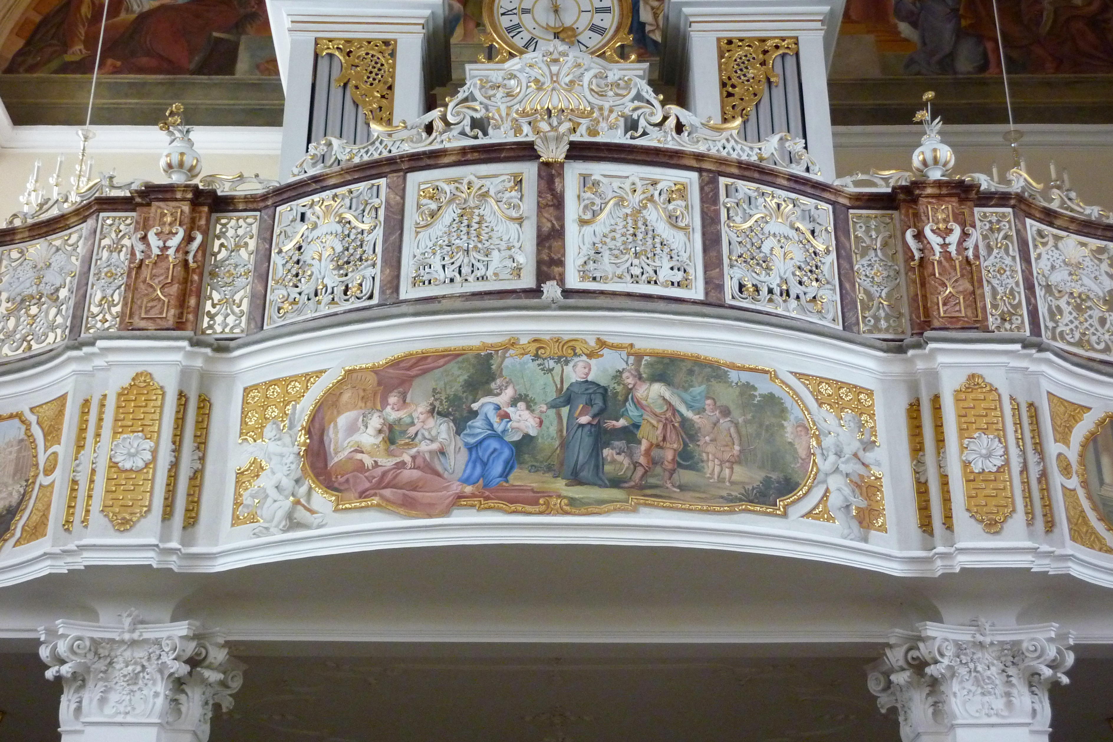 Katholische Pfarrkirche, ehemalige Kloster- und Wallfahrtskirchellfahrtskirche St. Leonhard in Unterliezheim, einem Ortsteil von Lutzingen im Landkreis Dillingen an der Donau (Bayern), Empore; Gemälde von Christoph Thomas Scheffler; Darstellung (mittlere Szene): hl. Leonhard am Kindbett der Gemahlin von König Childebert